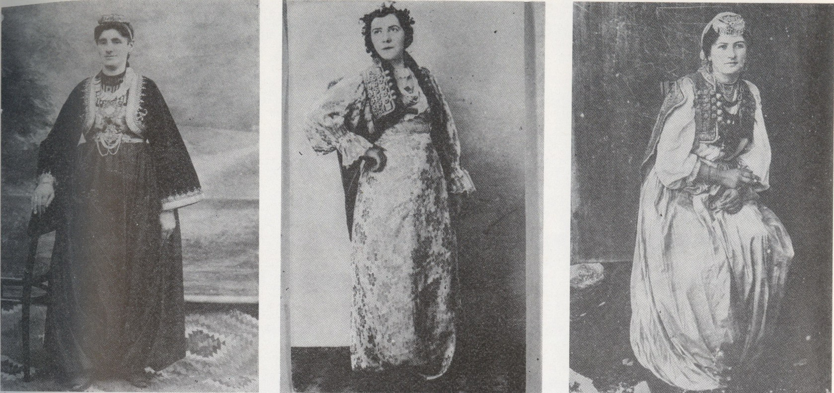 Gradska nošnja u Banjoj Luci krajem XIX veka.